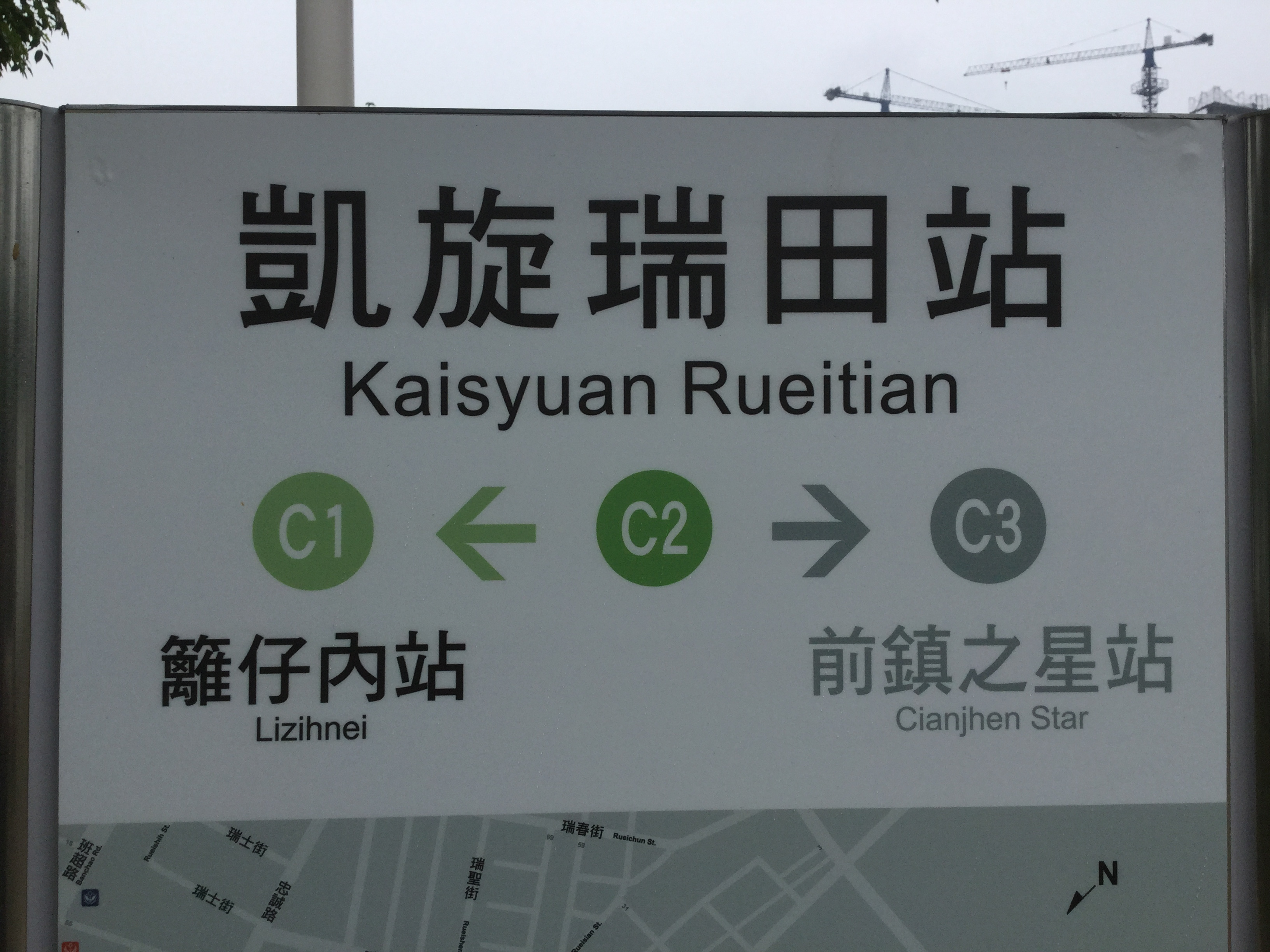 環狀輕軌凱旋瑞田站站名牌